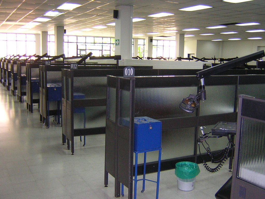 Clinica (área de practica), Facultad de Odontología, Área de la Salud, Universidad de Antioquia, Medellín, Colombia (esta foto la tome yo, y la libero al dominio público)